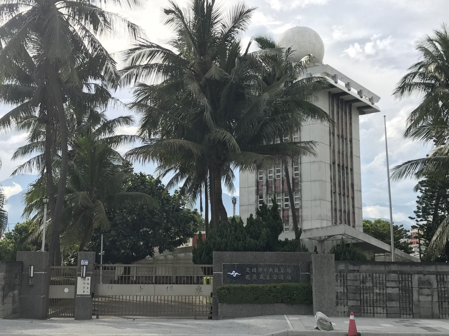 中文（台灣）: 交通部中央氣象局花蓮氣象雷達站第二代雷達塔